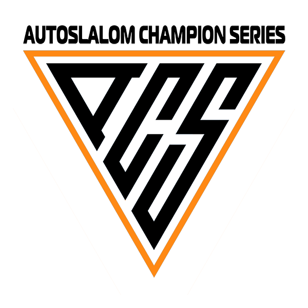 Логотип